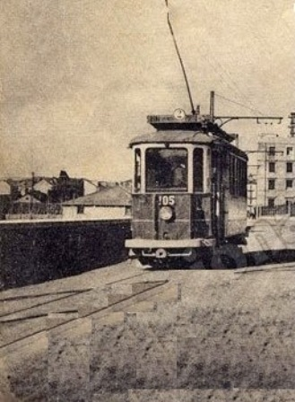 Savona - Tram 105